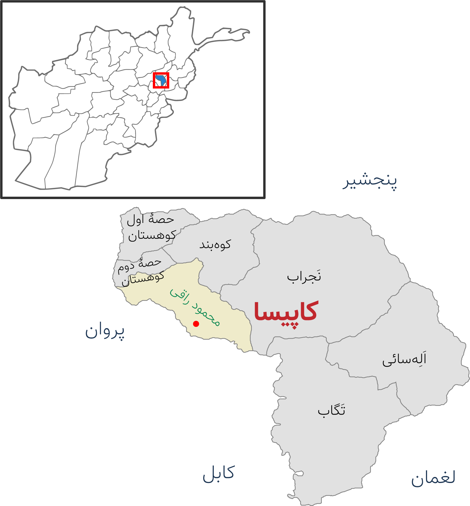 نقشه ولایت کاپیسا